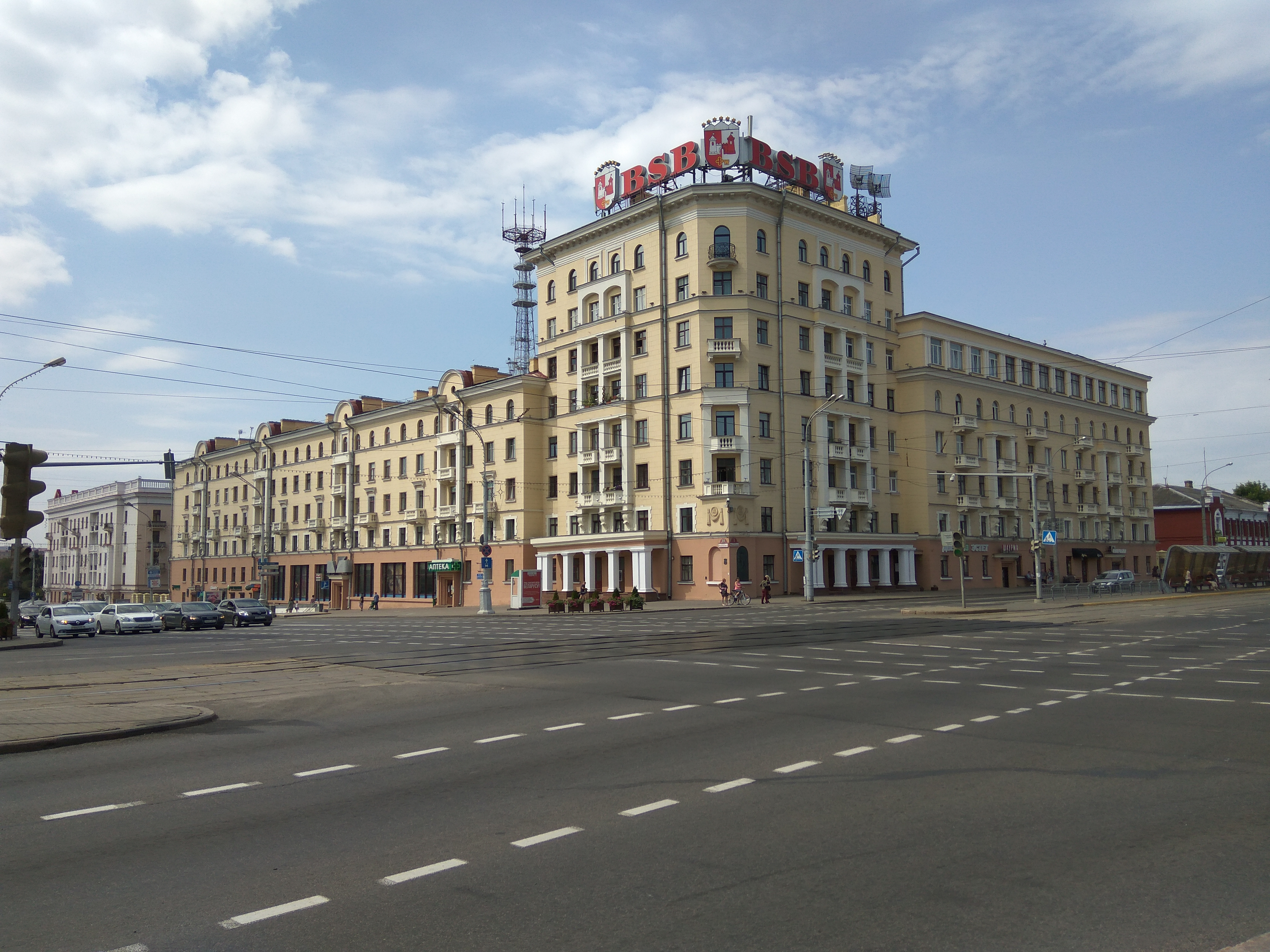 Мінск. пр. Незалежнасці 39 / пр. Машэрава 1